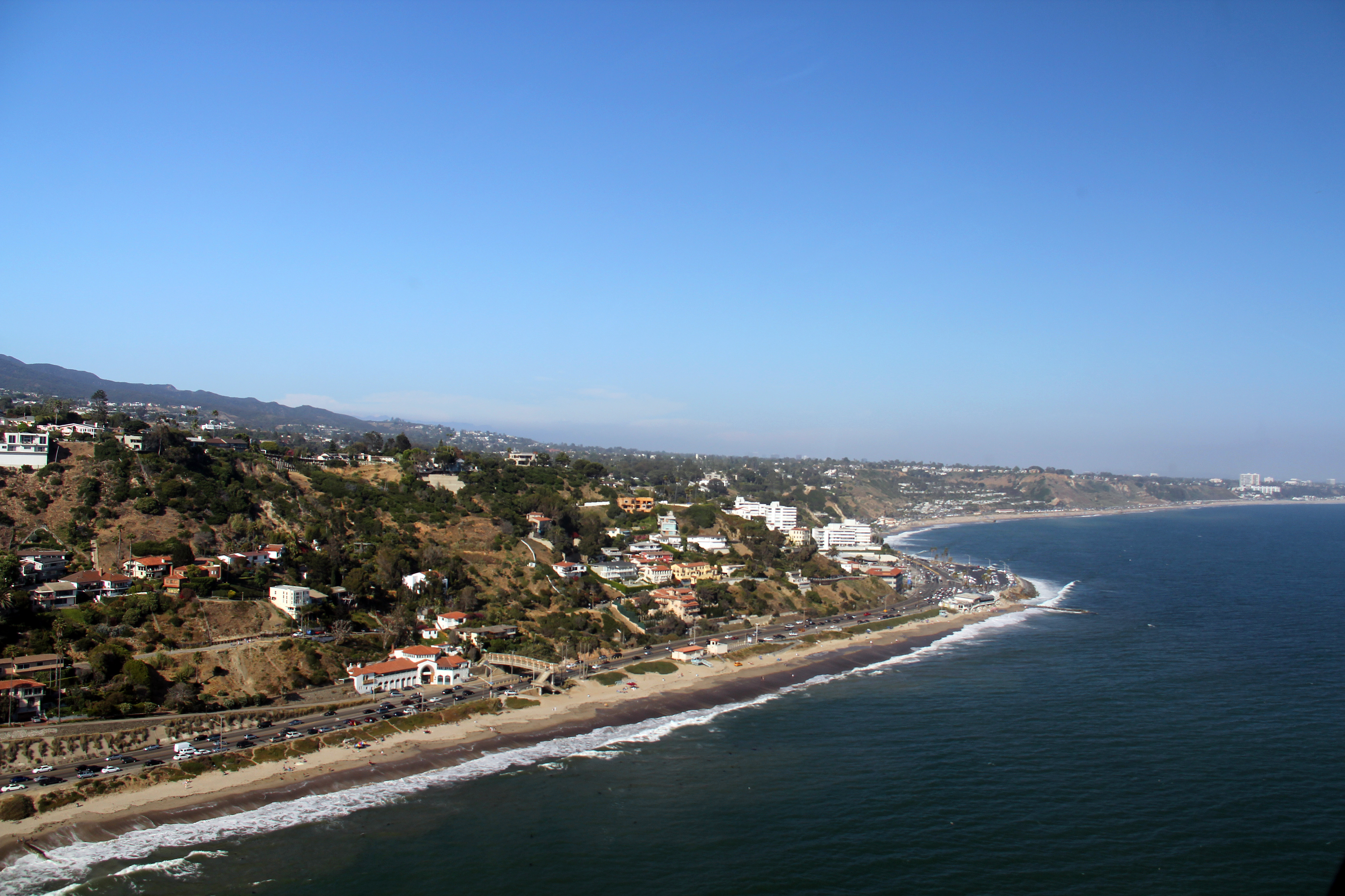 Pacific Palisades Coast